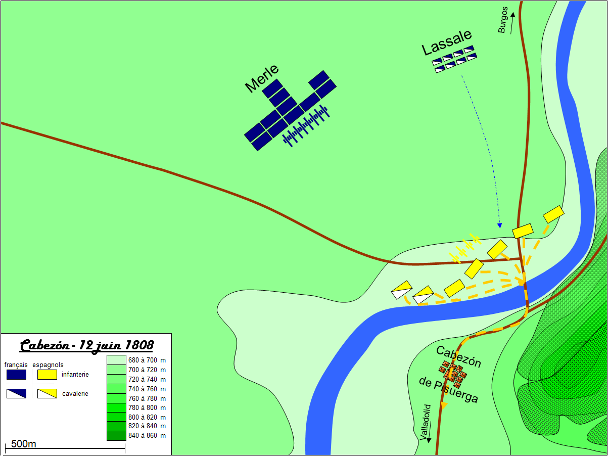 Bataille de Cabezon 1808